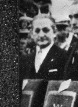 Franco met vrouw Dona Carmen Polo (rechts) links opvolger Prins Juan Carlos met